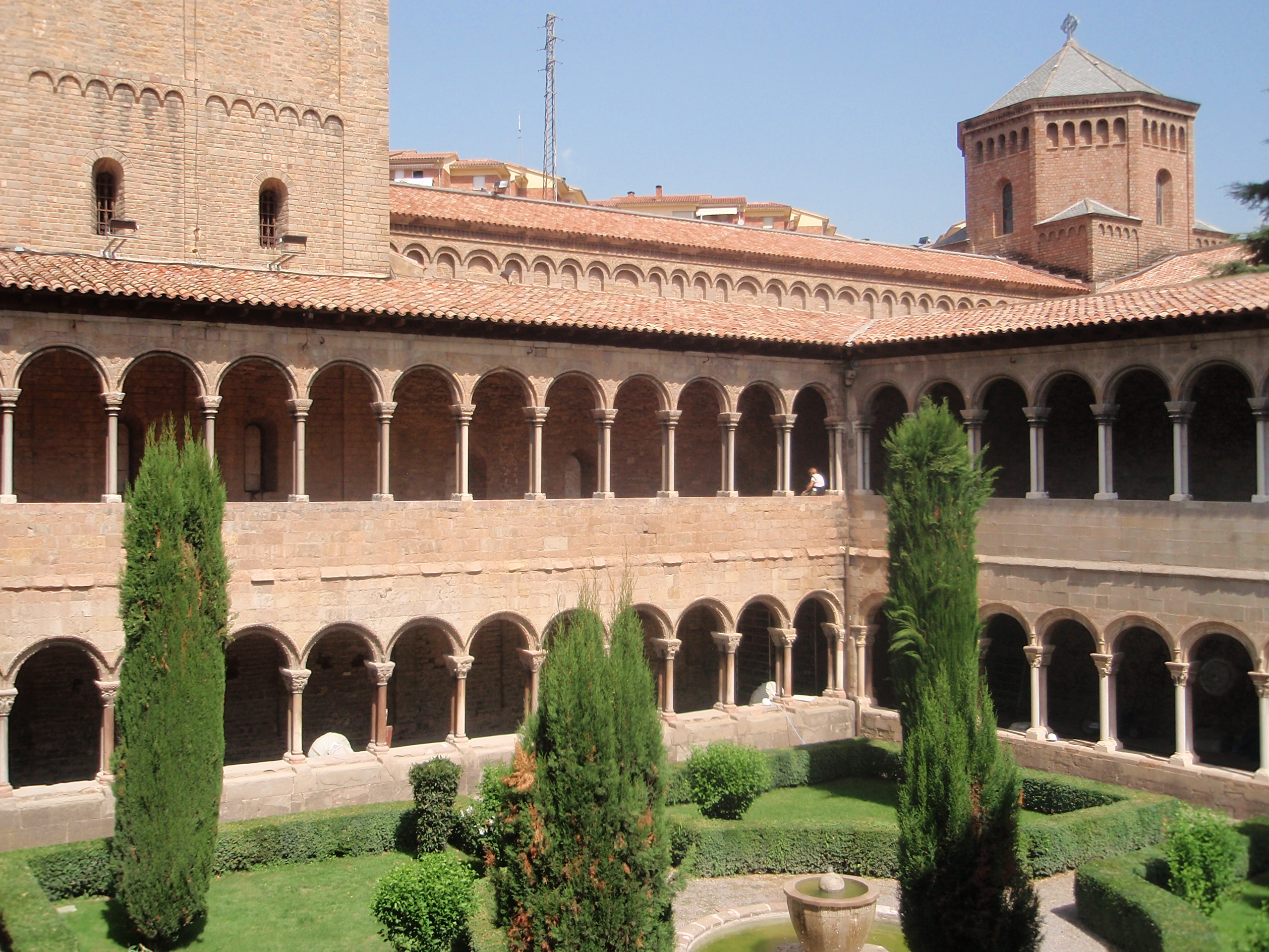 Monestir de Santa Maria de Ripoll